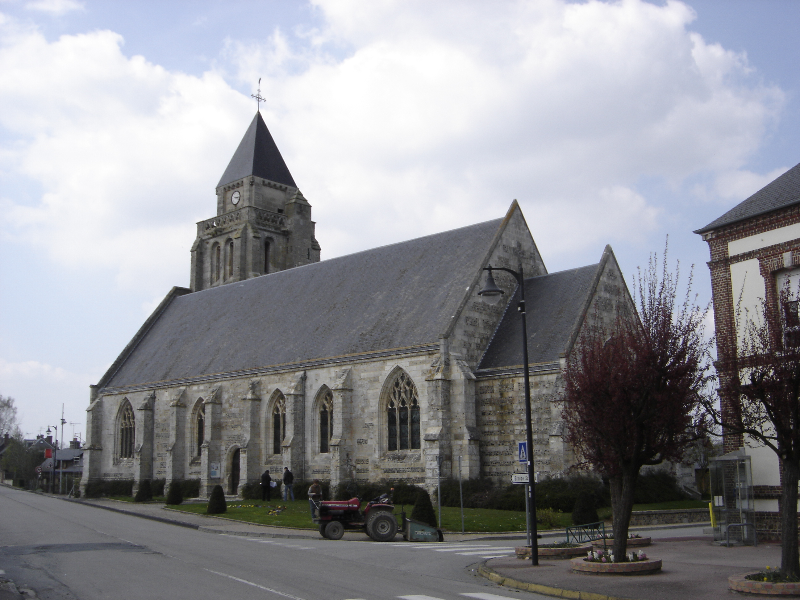 Eglise d'Epaignes - Eure - France